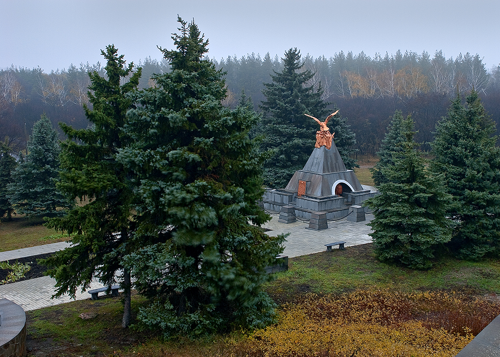 Мемориал, парк и курган "Острая Могила".14 ноября 2009